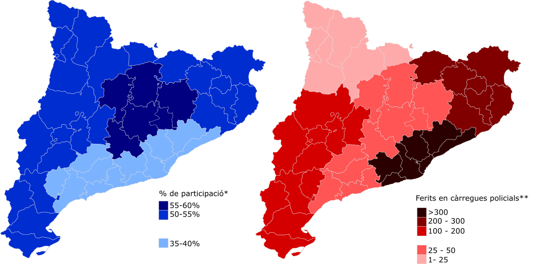 Percentatge de participació (en blau)[1] i número de ferits en càrregues policials (en vermell)[2][3] durant el referèndum de l'1 d'octubre.